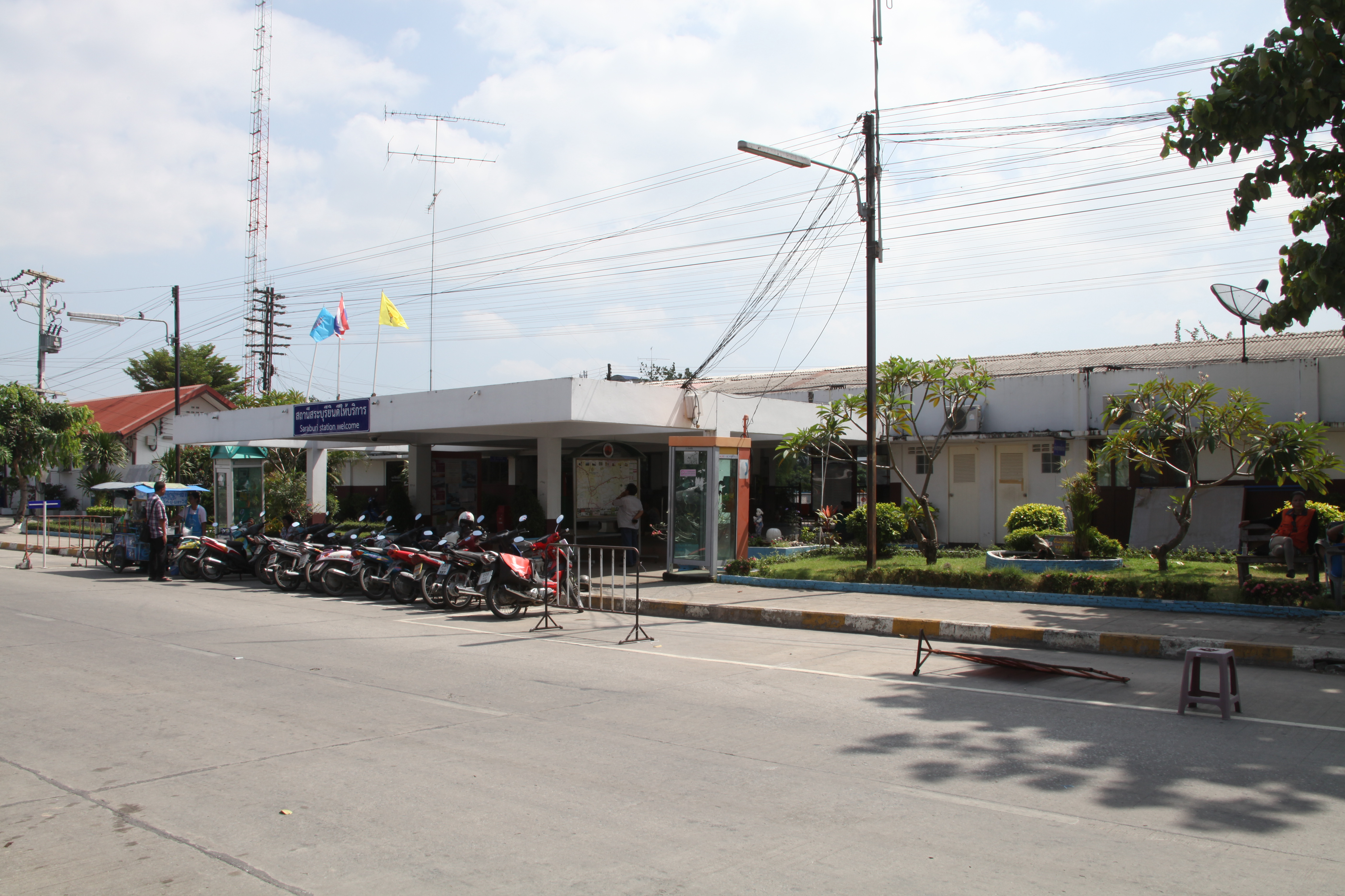 サラブリー駅